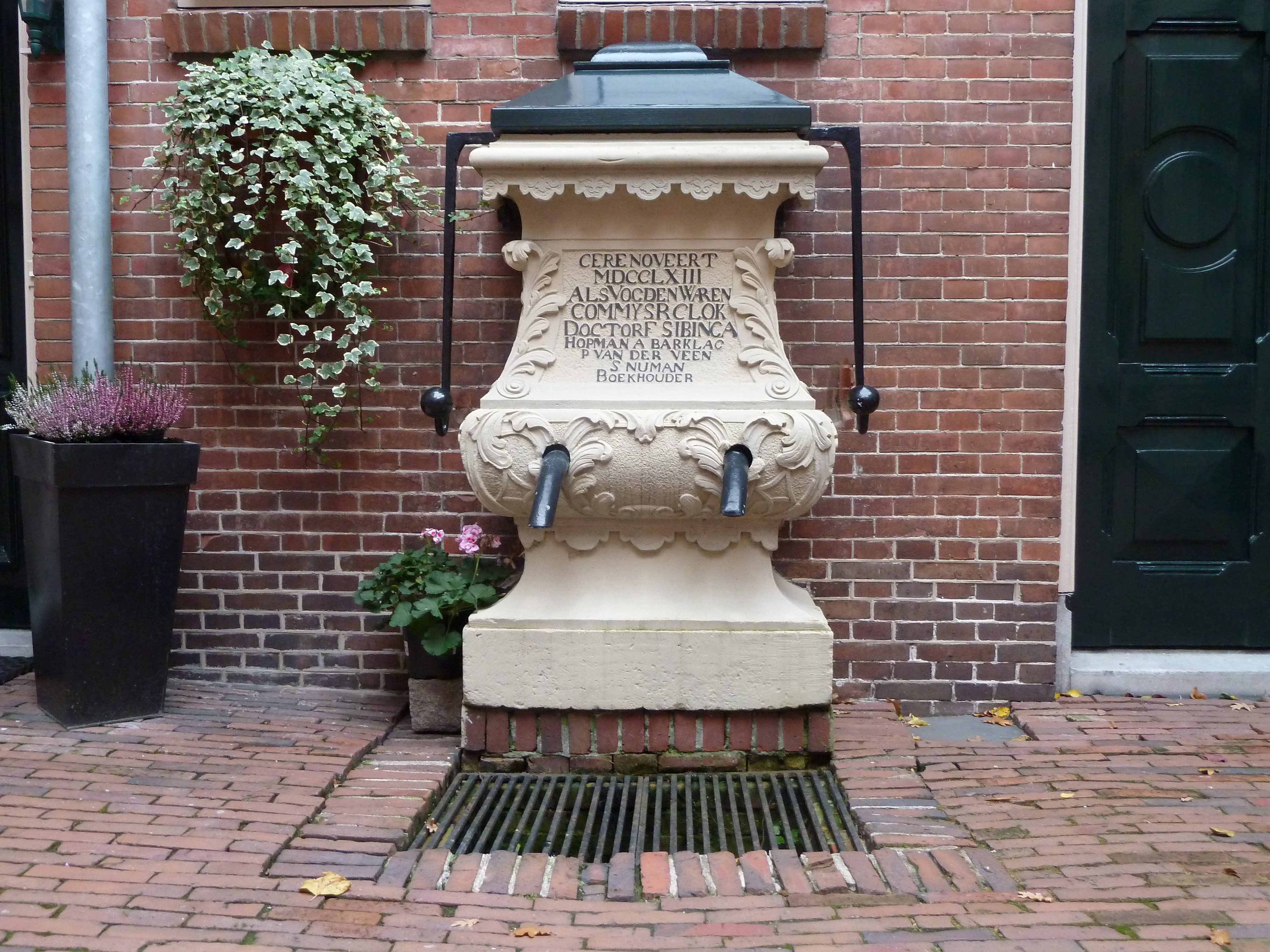 Pomp op binnenplaats van Armhuiszitten Convent in de stad Groningen (Nederland).